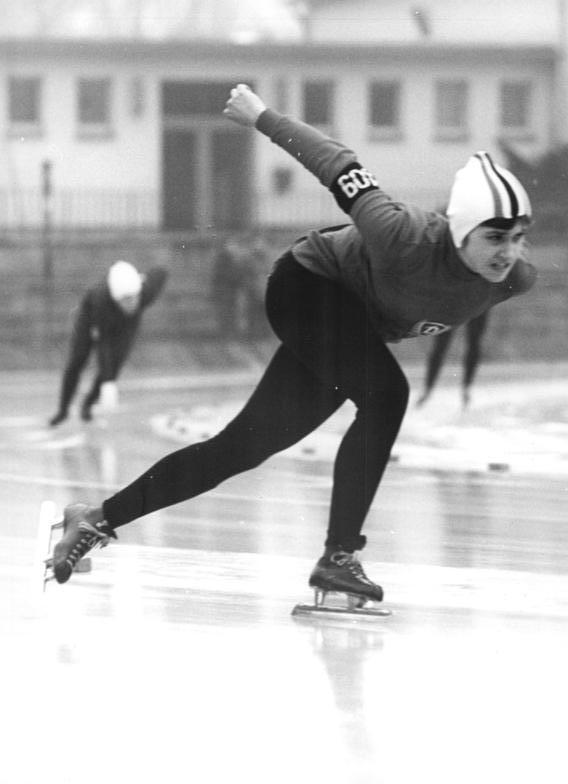 Rosemarie Taupadel ADN-ZB Mittelstädt 28.12.71 Berlin: DDR-Einzelmeisterschaften im Eisschnellaufen auf der 400-m-Bahn im Sportforum am 27.12.71 Über 1500-m-der Damen erkämpfte sich Rosemarie Taupadel vom SC Dynamo Berlin in 2:31,9 min den Titel. Abgebildete Personen: Taupadel, Rosemarie: Eisschnelläuferin, SC Dynamo Berlin, Olympiade 1972, DDR